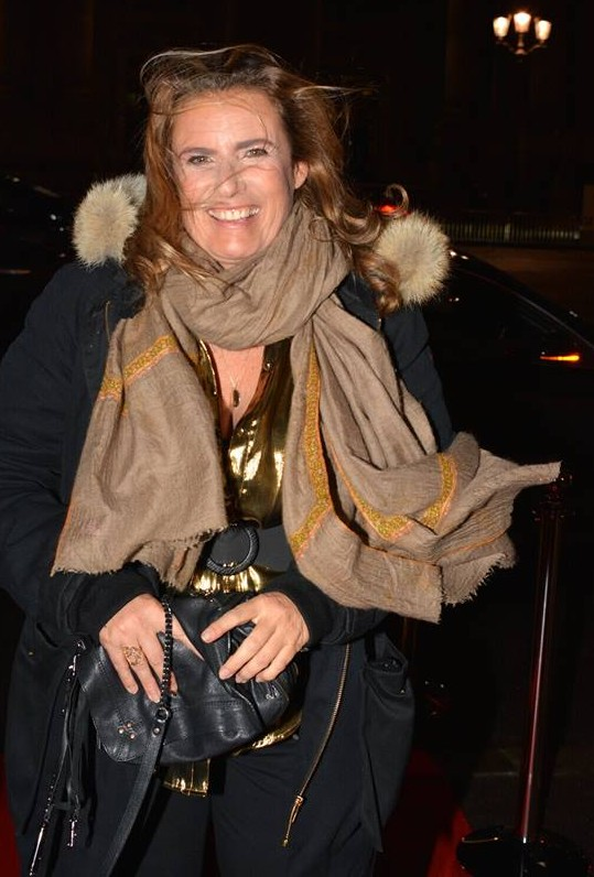 Liza Azuelos au dîner des révélations des César du cinéma